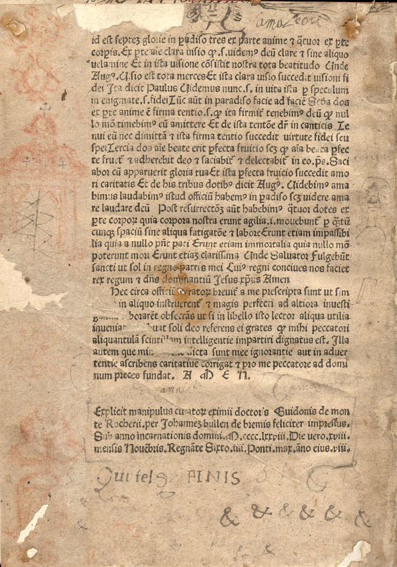 Letztes Blatt einer Inkunabel (Manipulos curatorum; gedruckt in Rom am 18. Nov. 1478 von Johann Bulle)